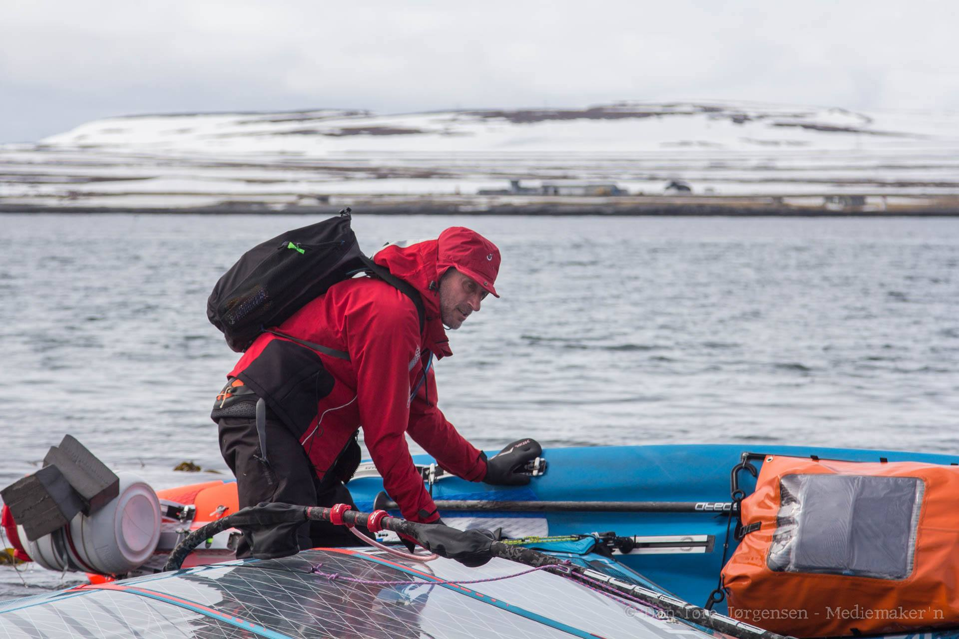 ג'ונתן דנט